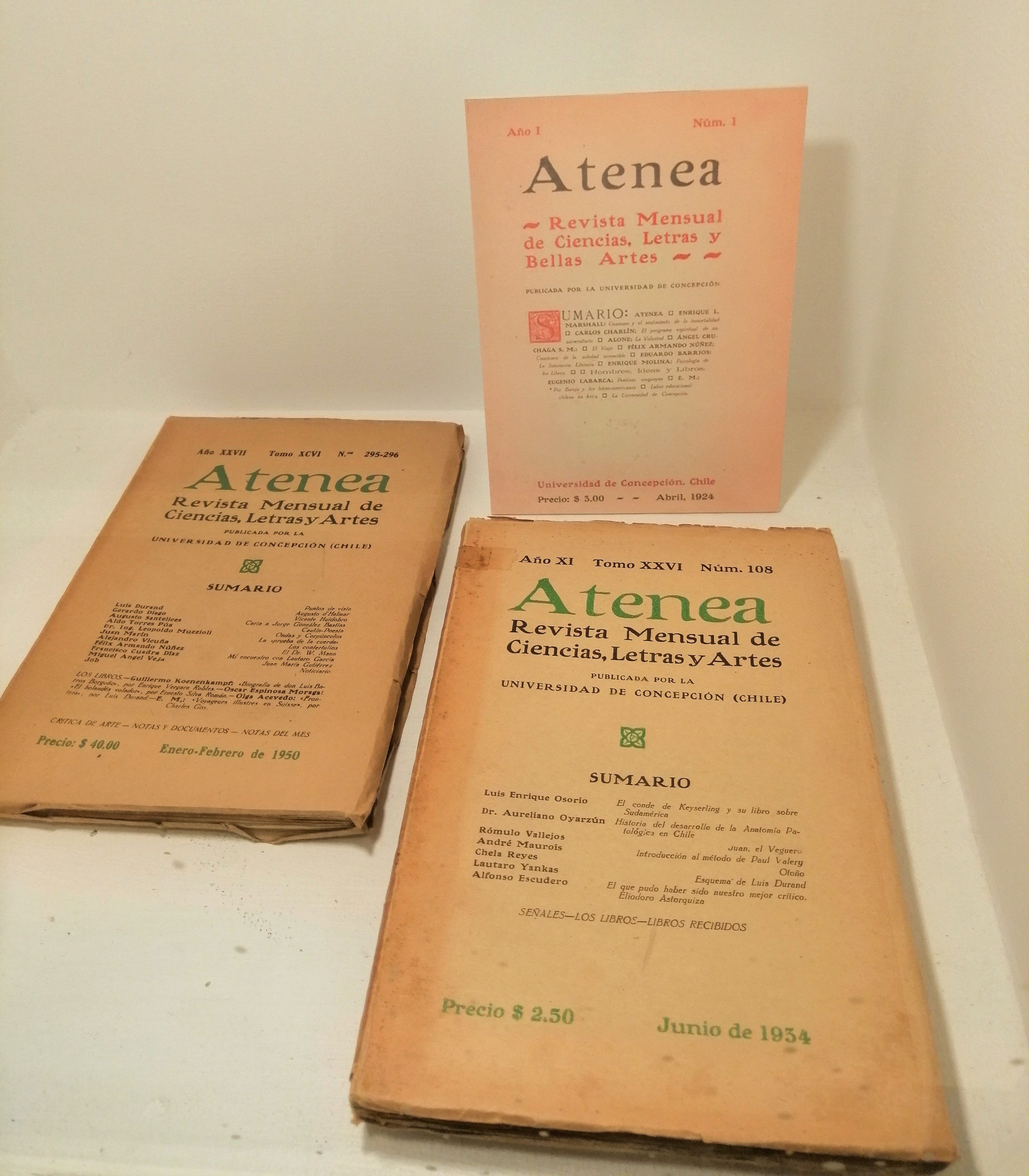 Ejemplares de la revista Atenea de la Universidad de Concepción, fundada por Enrique Molina. Números 1 (1924), 108 (1934) y 295-296 (1950). Exhibidas en la Galería de la Historia de Concepción. Parque Ecuador, Concepción, Chile.